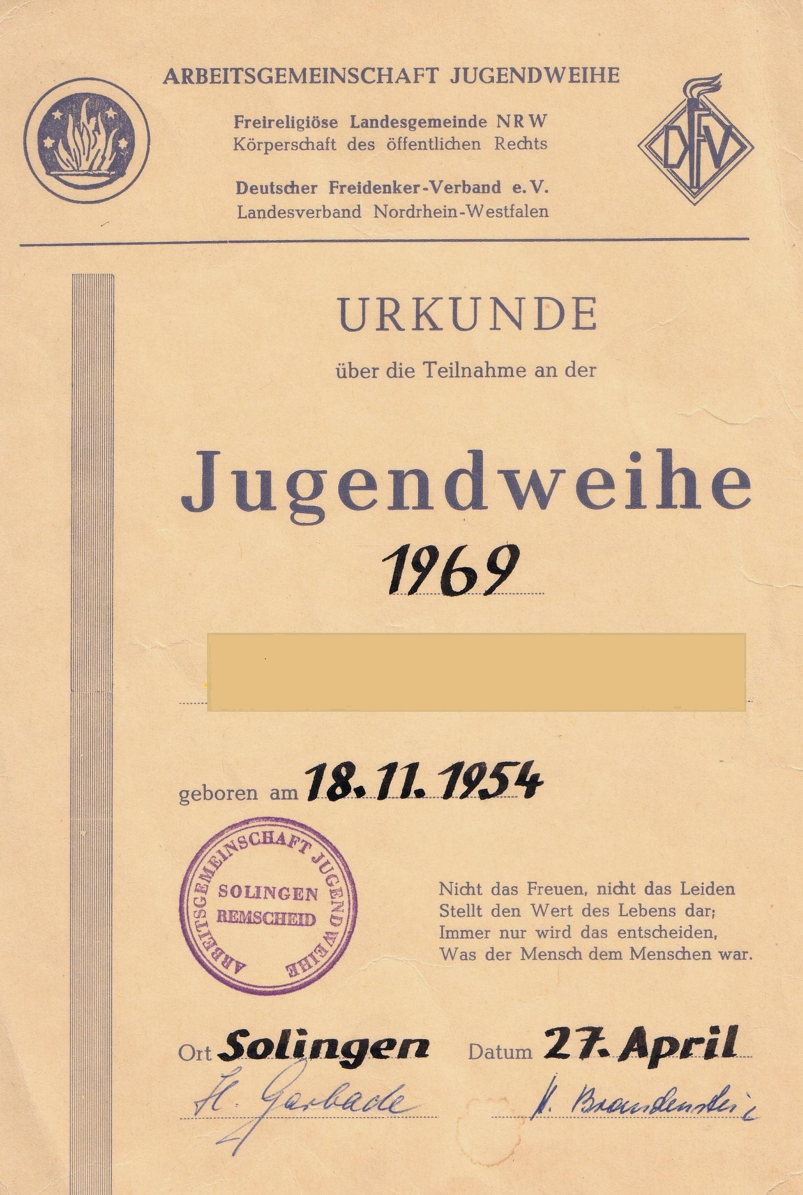 Urkunde zur Jugendweihe der Arbeitsgemeinschaft Jugendweihe, Deutscher Freidenker-Verband NRW und Freireligiöse Landesgemeinde NRW